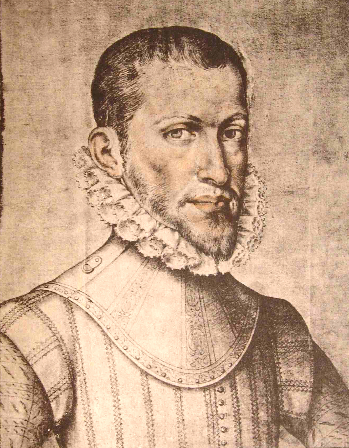 Retrato de Gonzalo Argote de Molina en Francisco Pacheco, El libro de descripción de verdaderos retratos, ilustres y memorables varones, [Sevilla], [1599].